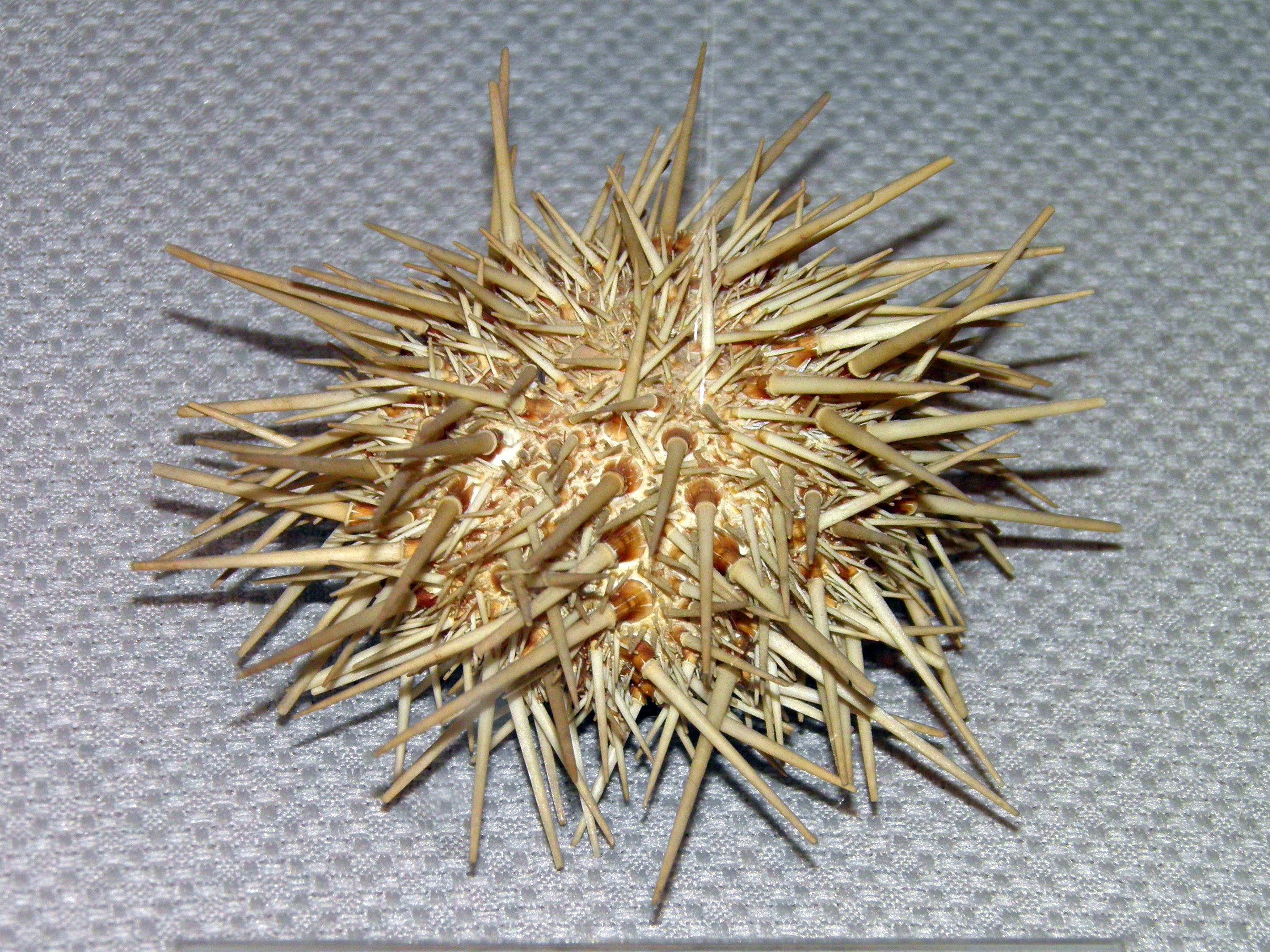 Альбинос Mesocentrotus nudus (или Strongylocentrotus nudus) в Научном музее ДВФУ (г. Владивосток)